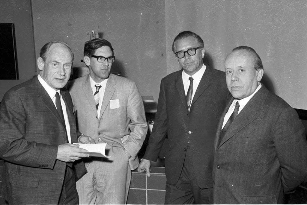 in der Christian-Albrechts-Universität (CAU). Im Bild die Physiker v.l.n.r.: Prof. Dr. Heinz Maecker, Dr. Bötticher, Dr. T. Peters, Prof. Dr. Walter Lochte-Holtgreven.